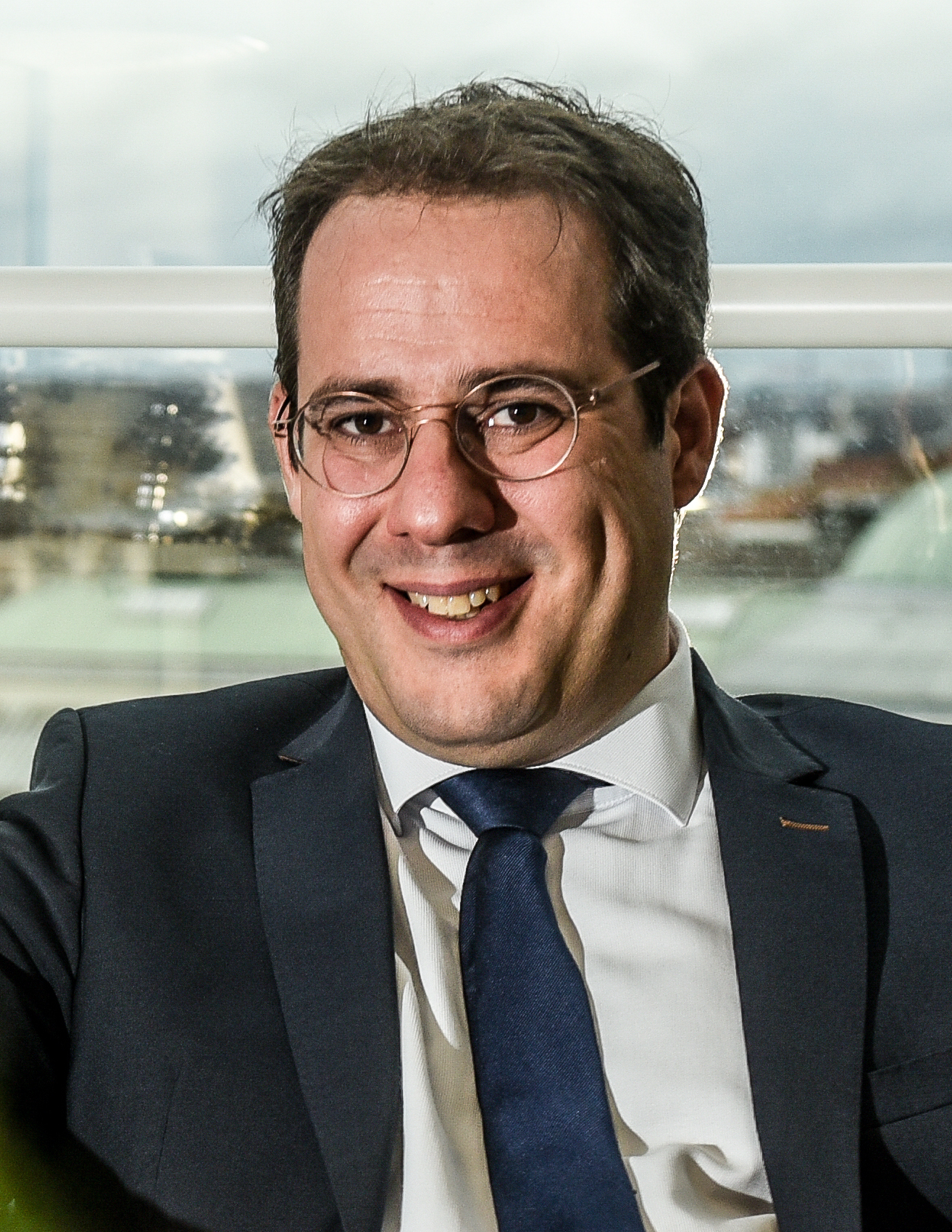 David Clarinval ( MR ) vice-Premier ministre belge dans son cabinet à Bruxelles (copyright: Vincent LORENT)